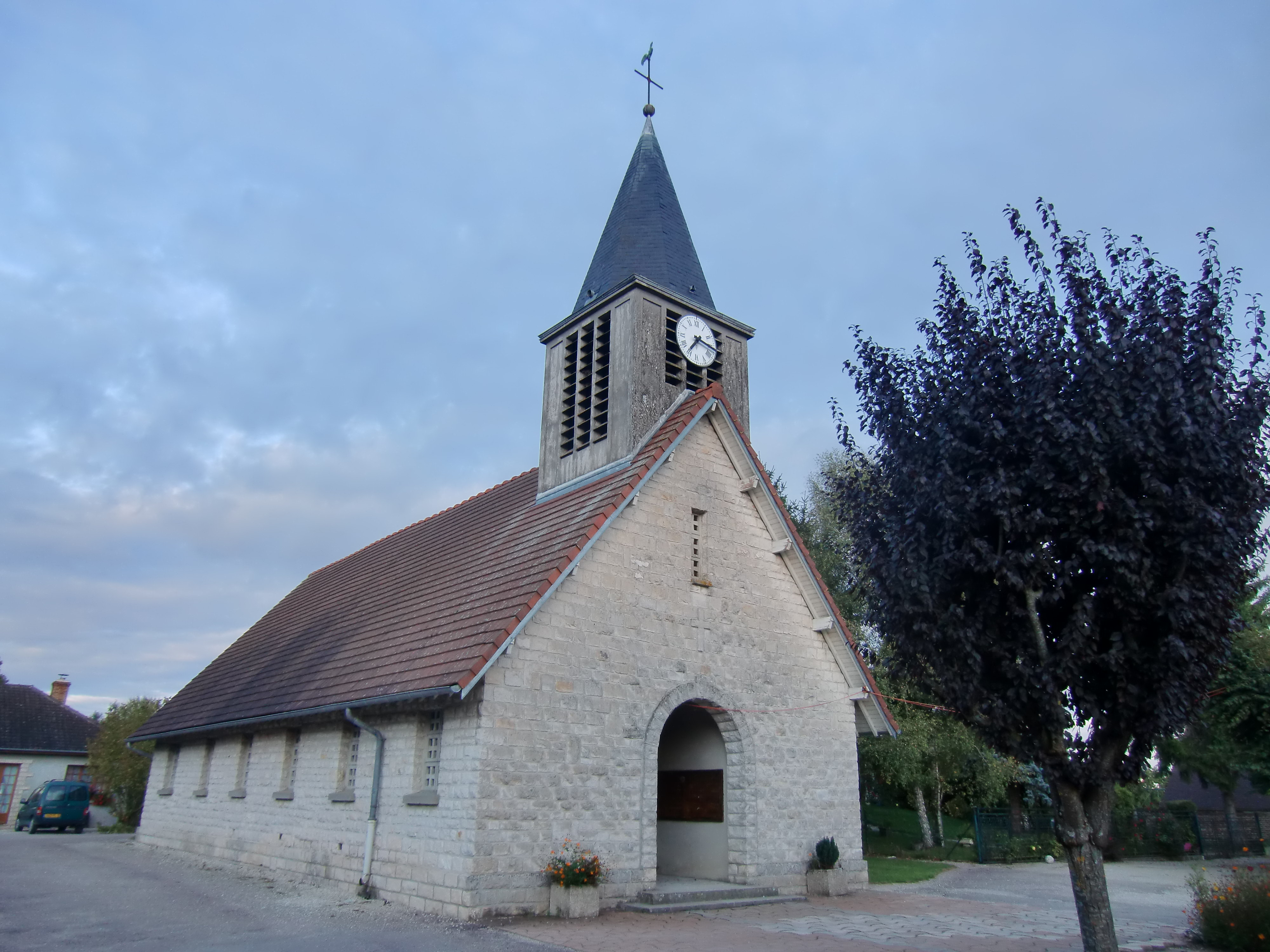 Eglise de la Nativité de la Vierge à Courteranges (Aube - Champagne - France)